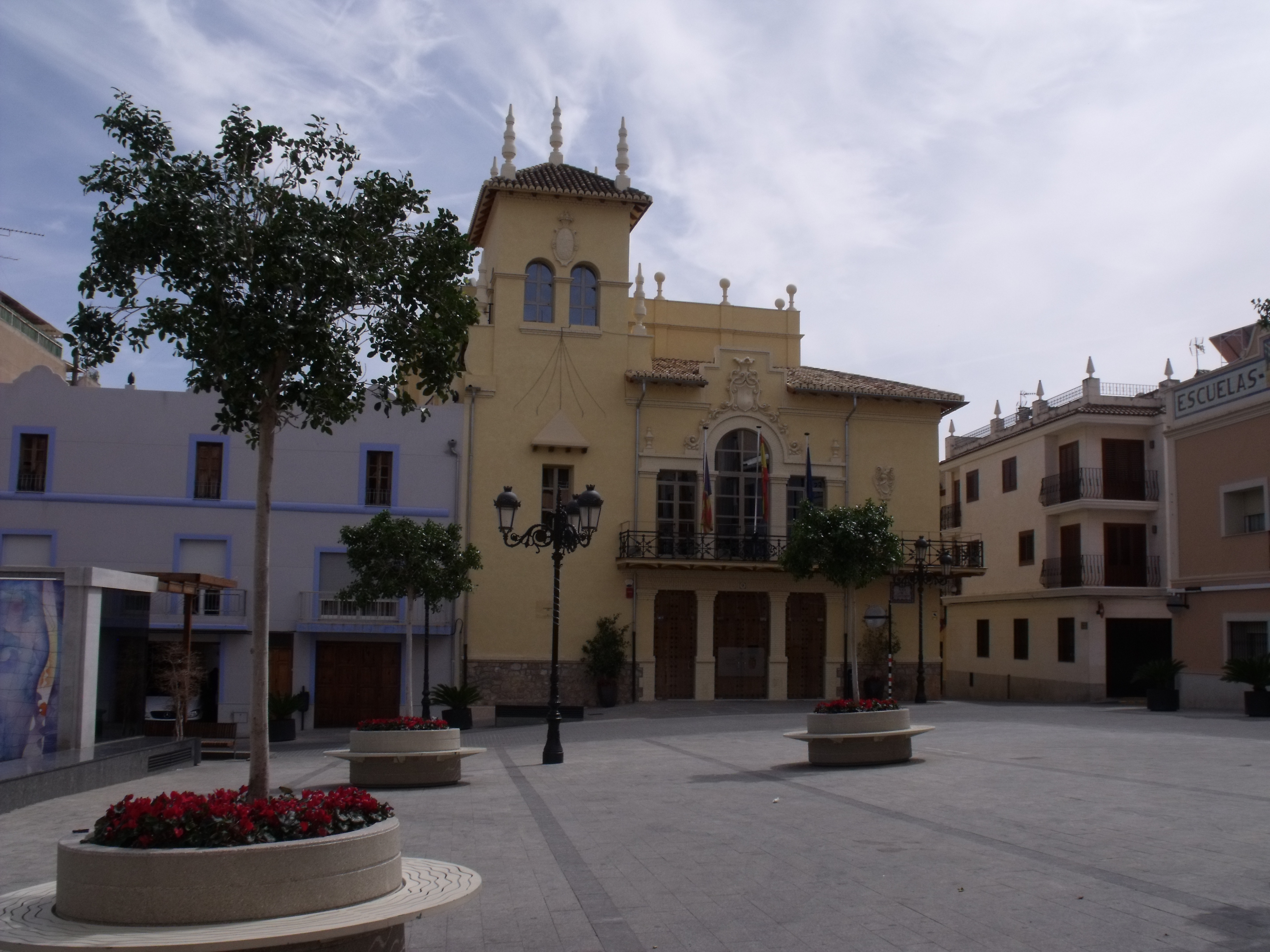 Plaza del Ayuntamiento de Ribarroja del Turia.